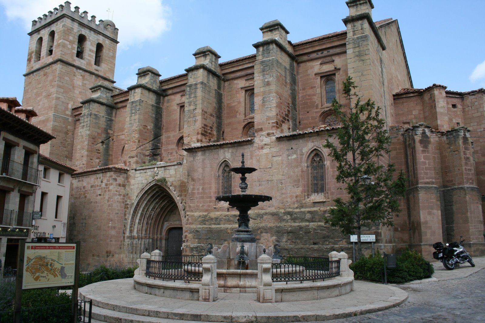 Iglesia ex-colegiata Mora de Rubielos